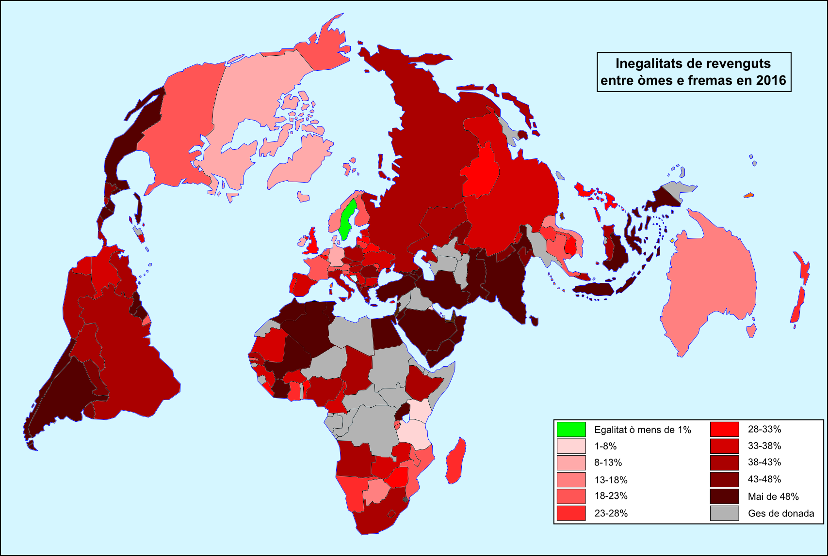 Inegalitats salarialas entre òmes et fremas en 2016